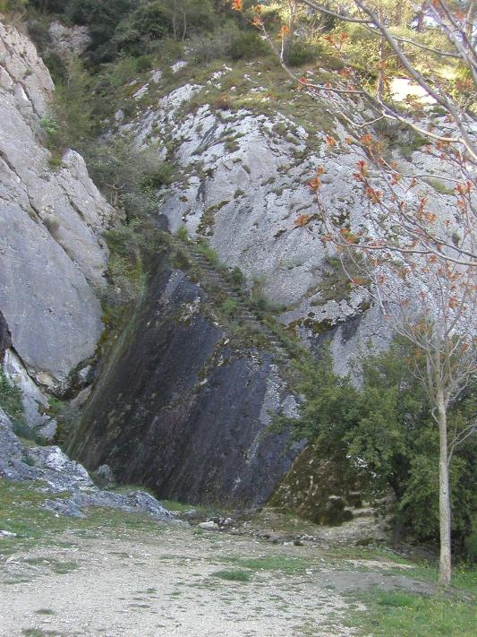 Commune de Robion (Vaucluse) Escalier montant vers la source de l'Escanson Photo personnelle prise le 20 avril 2005 Turris